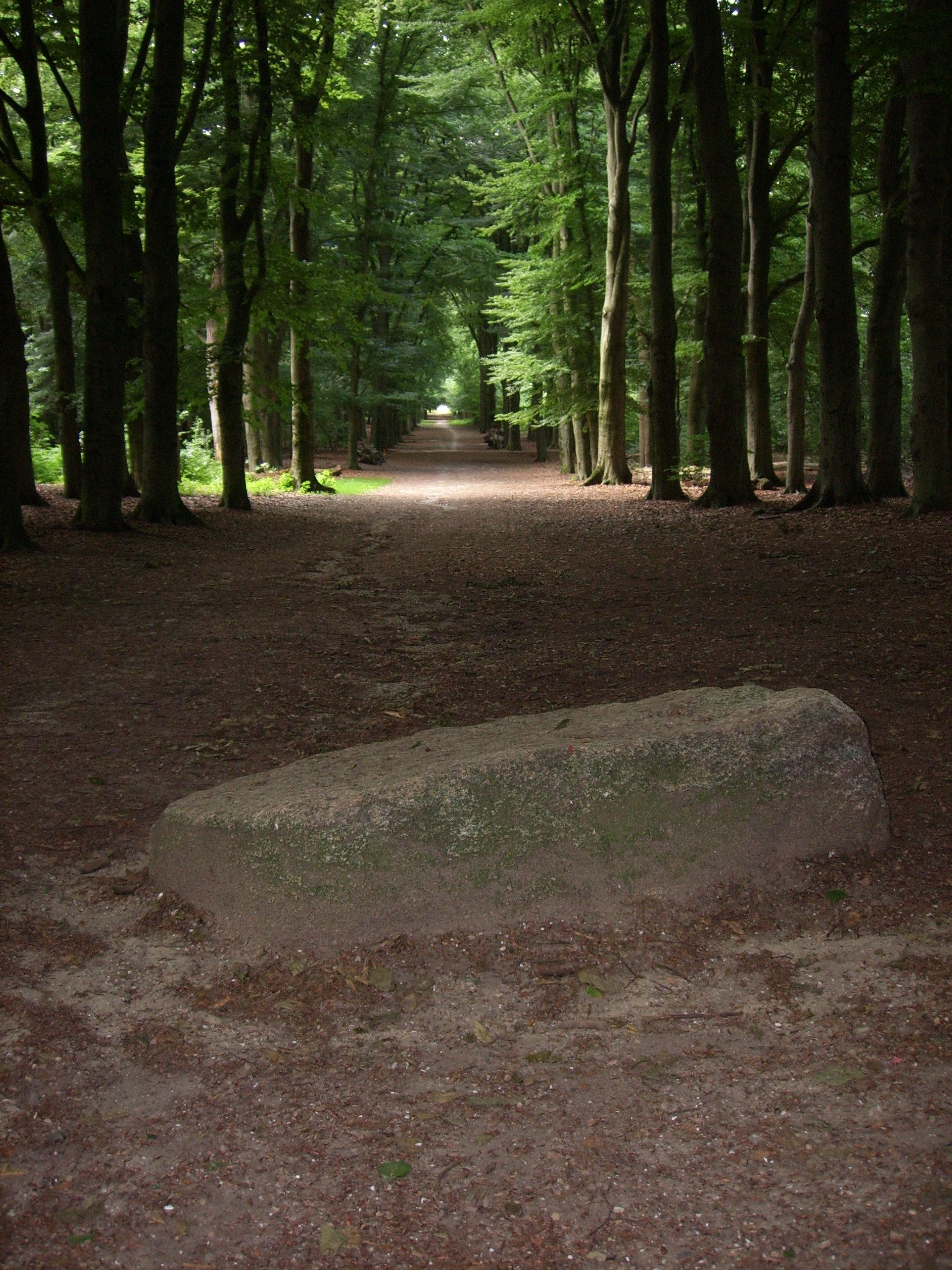 De bloedsteen te Ede. (Foto Ruben A. Koman, 2010)